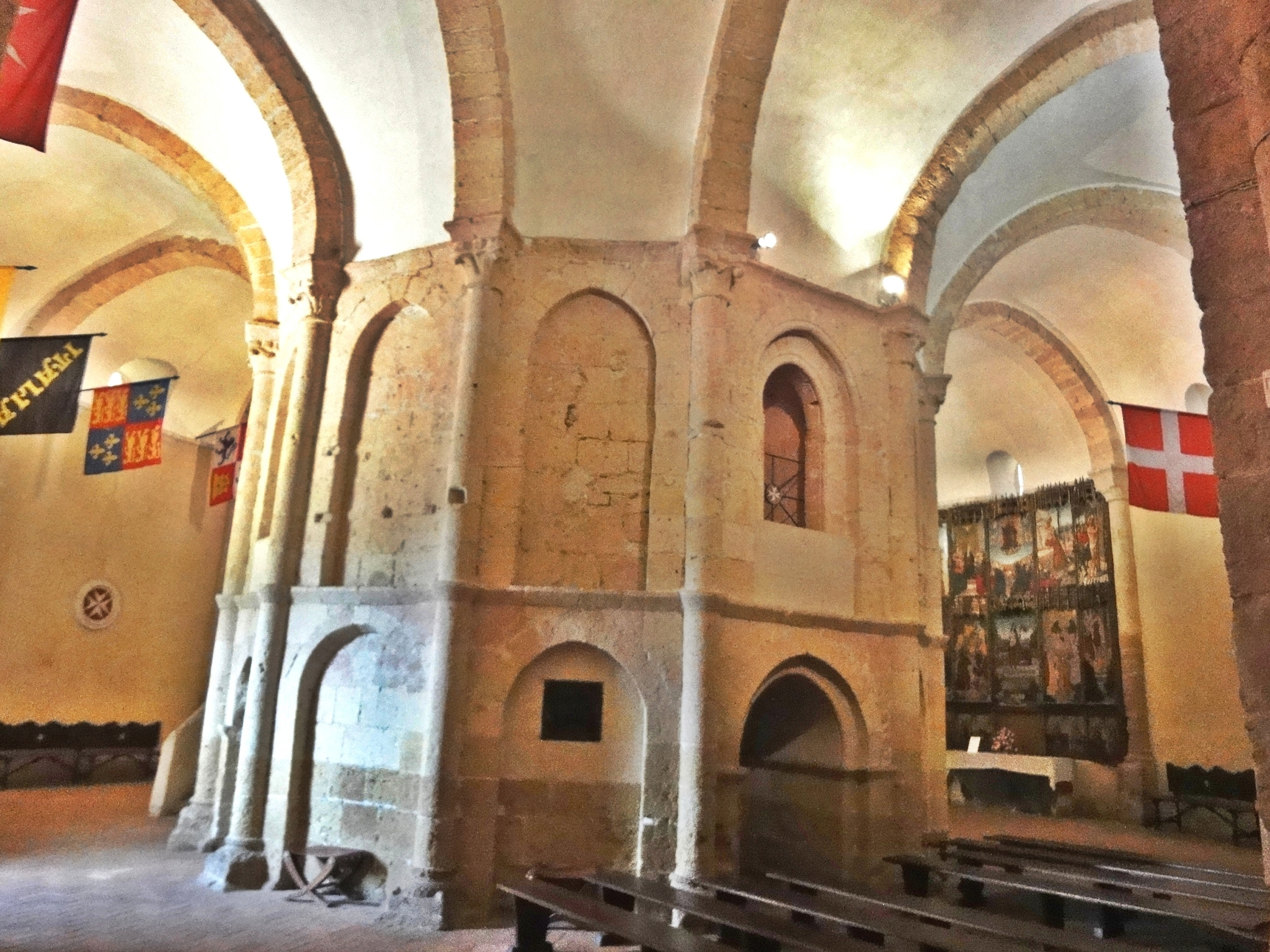 Iglesia de la Vera Cruz, en Segovia (Castilla y León, España).